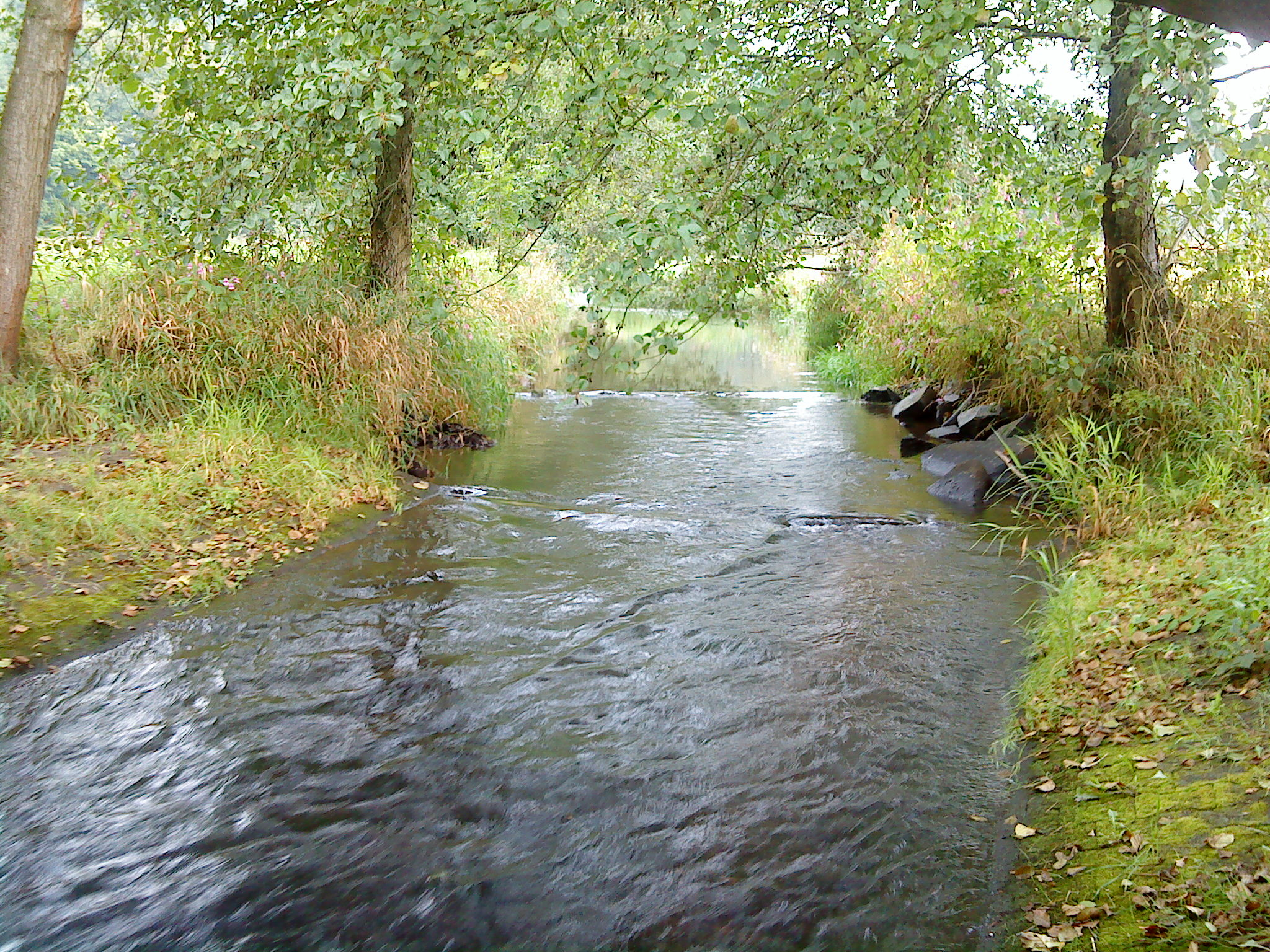 Die Schmale Sinn kurz vor ihrer Mündung in die Sinn bei Sinntal, NSG Sinnwiesen von Altengronau